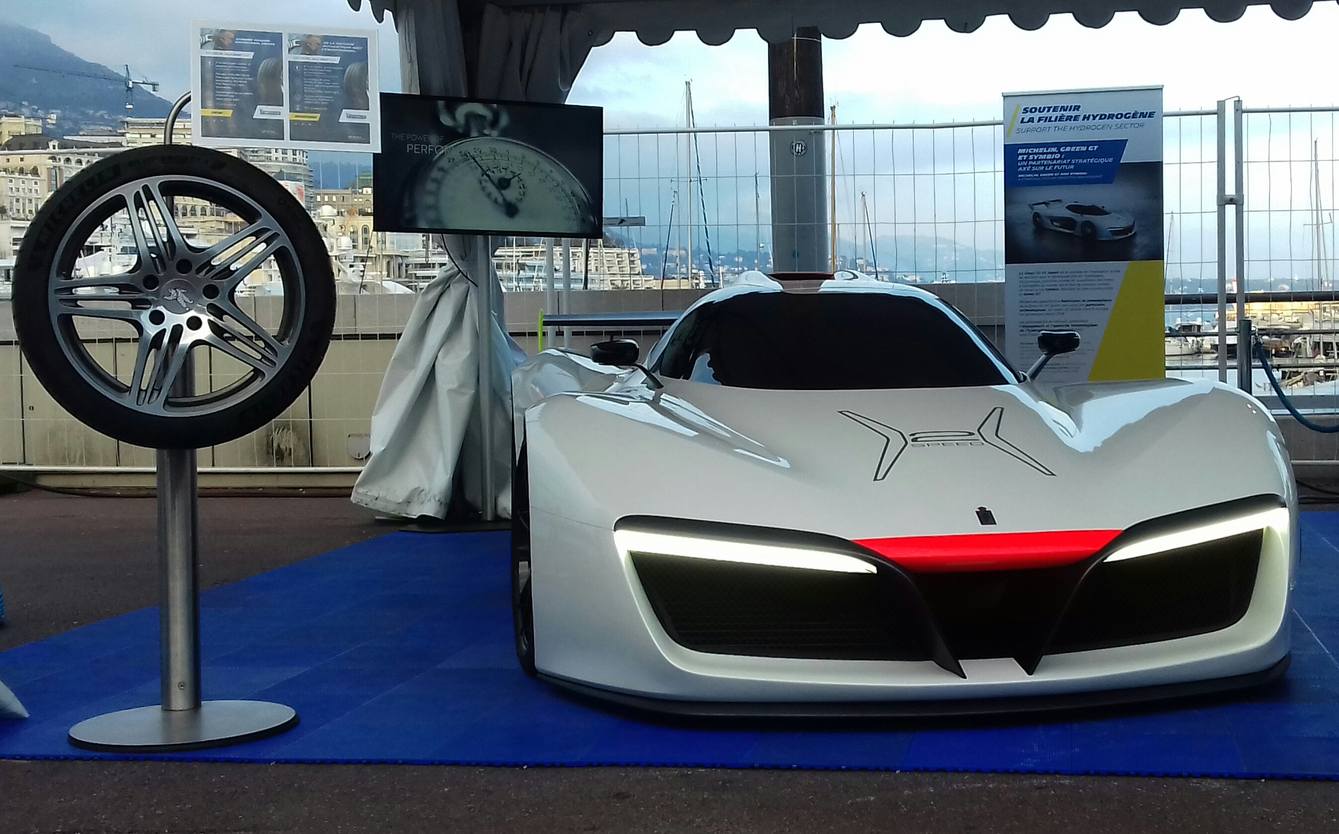 Siam site GGT